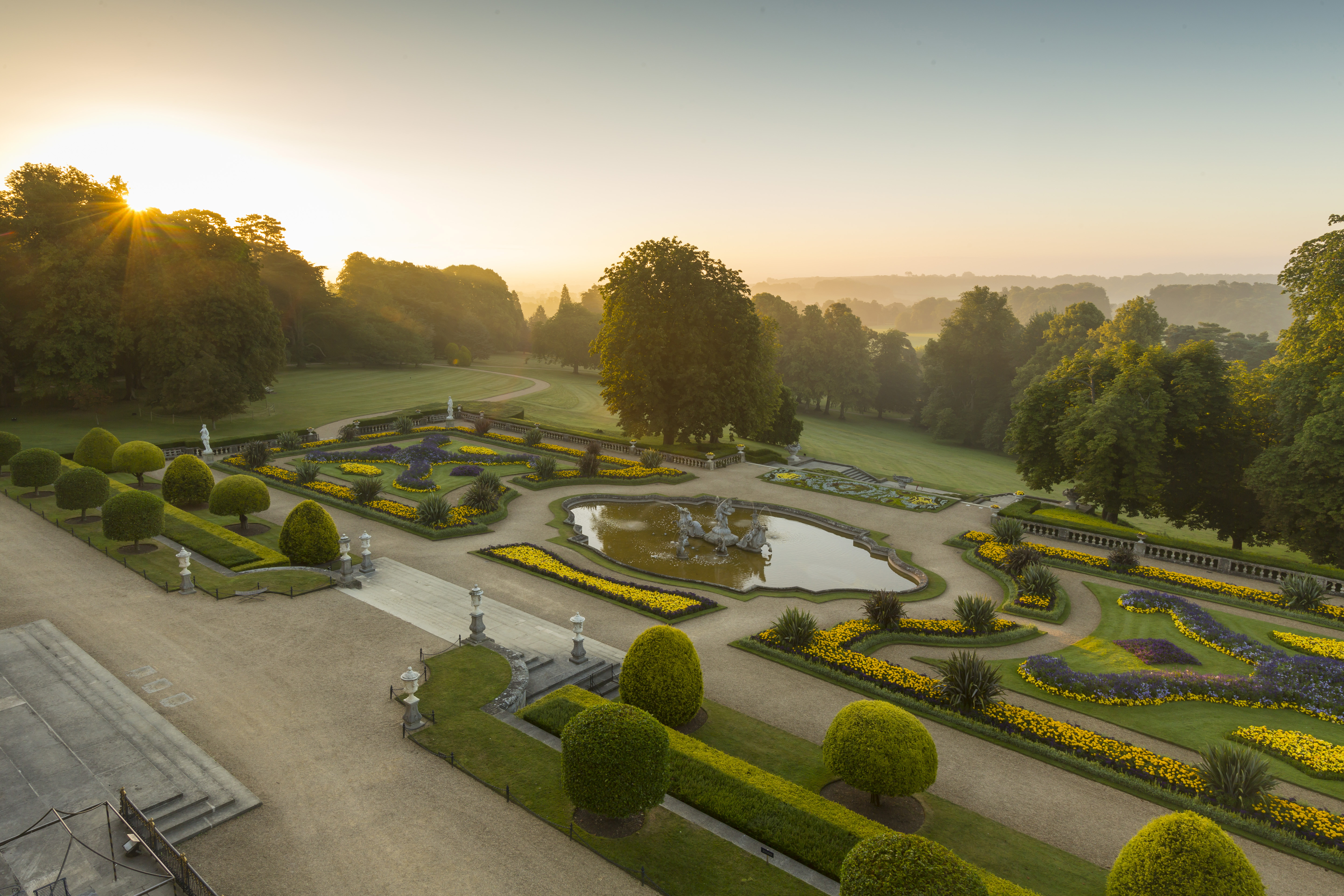 Waddesdon Manor's parterre at sunrise